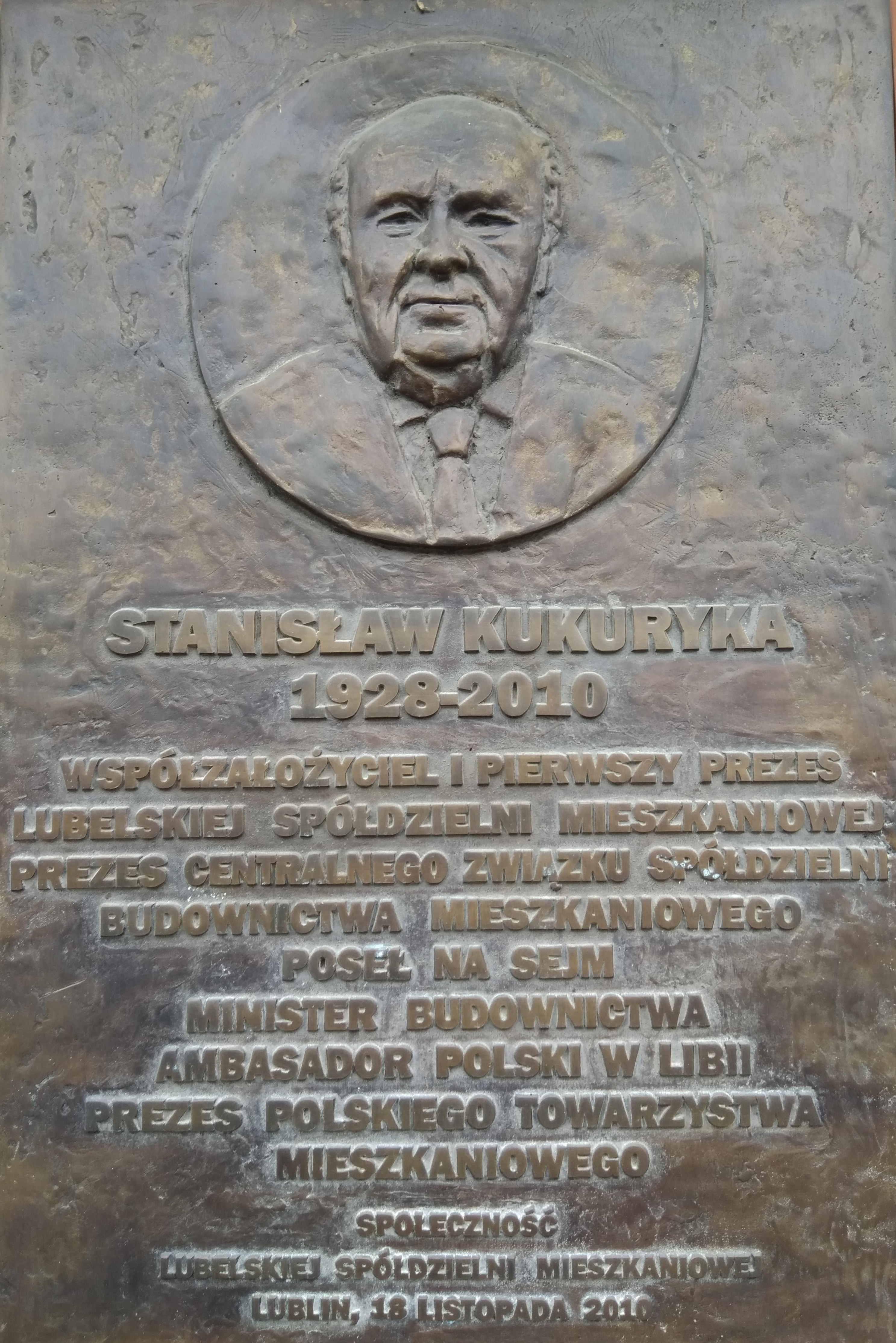 Tablica pamięci Stanisława Kukuryki na budynku Domu Kultury LSM przy ul. K. Wallenroda 4a w Lublinie